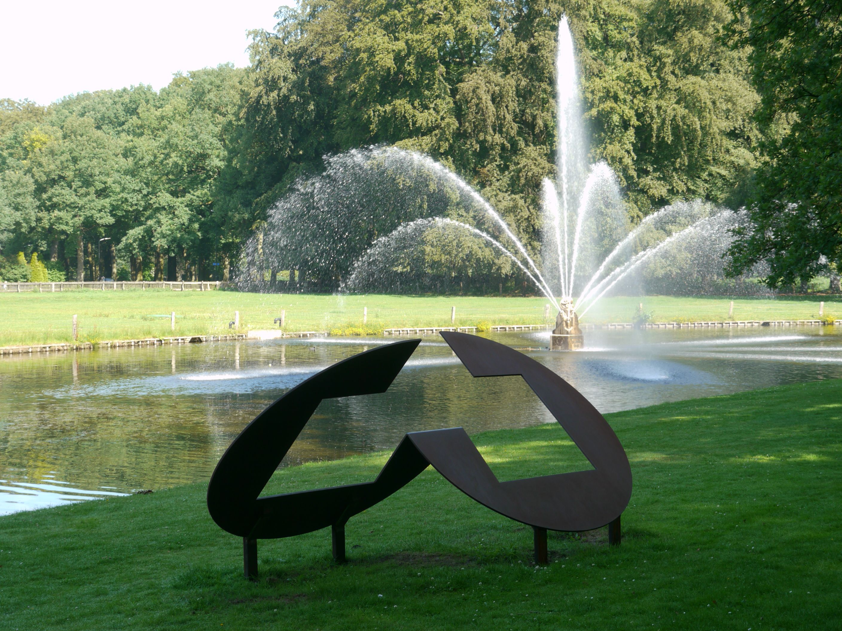 "Constructie 3", kunstwerk van cortenstaal door Cyril Lixenberg. 1978. Op de achtergrond de Kwartjesfontein